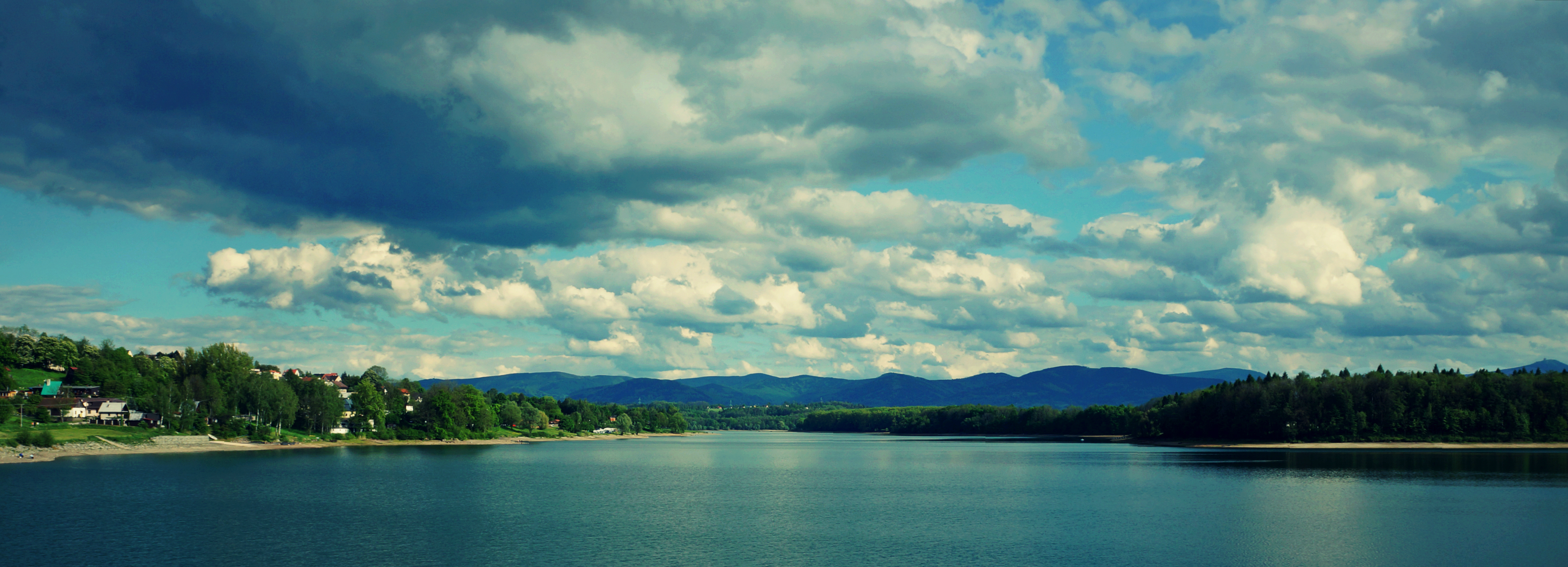 Pohled na Žermanickou přehradu od hráze směrem na Beskydy.